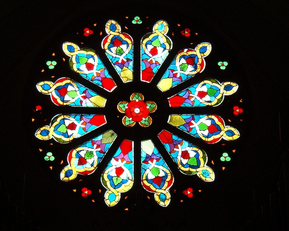 Rosett window Date August 2005